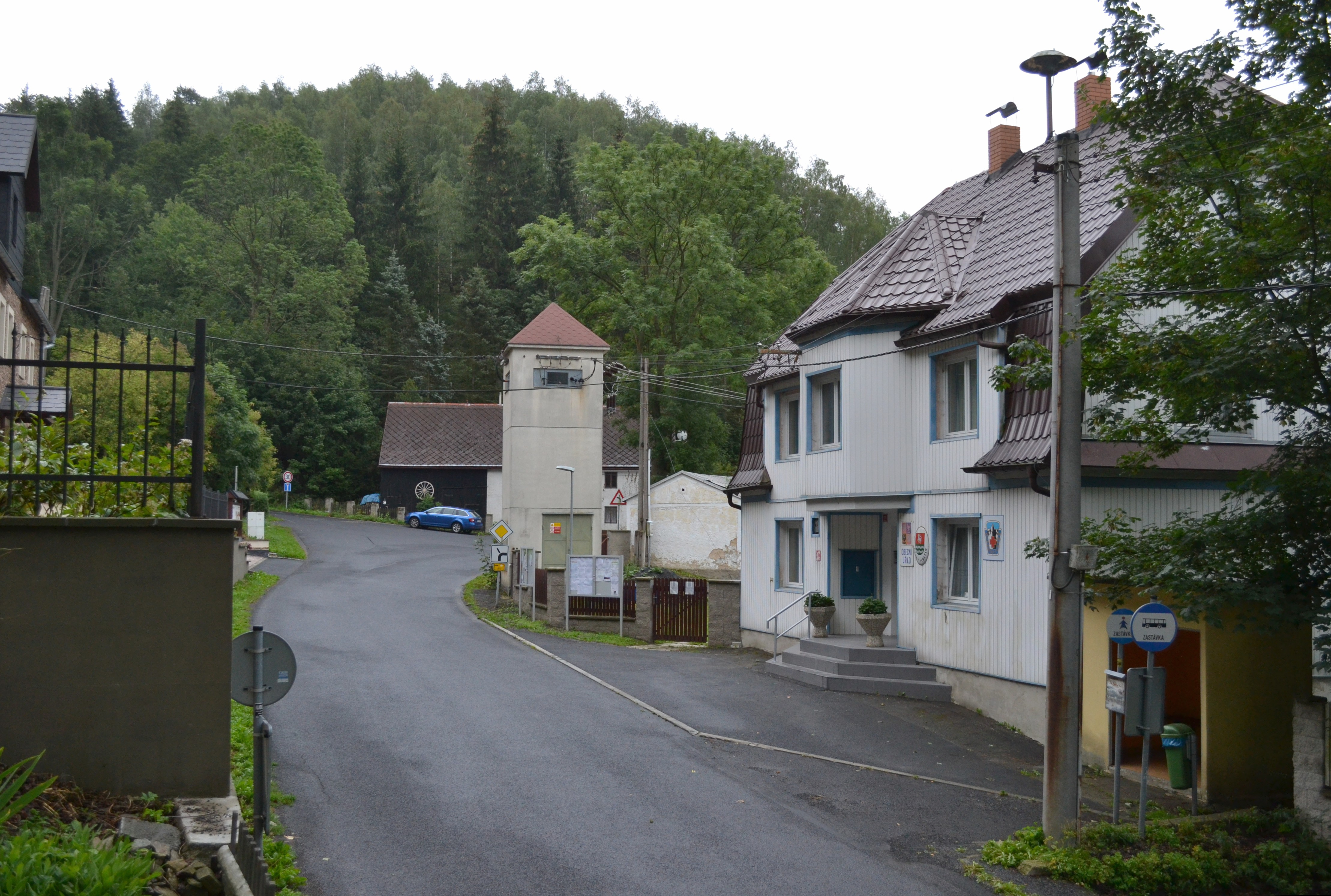 Český Jiřetín - centrum obce s obecním úřadem